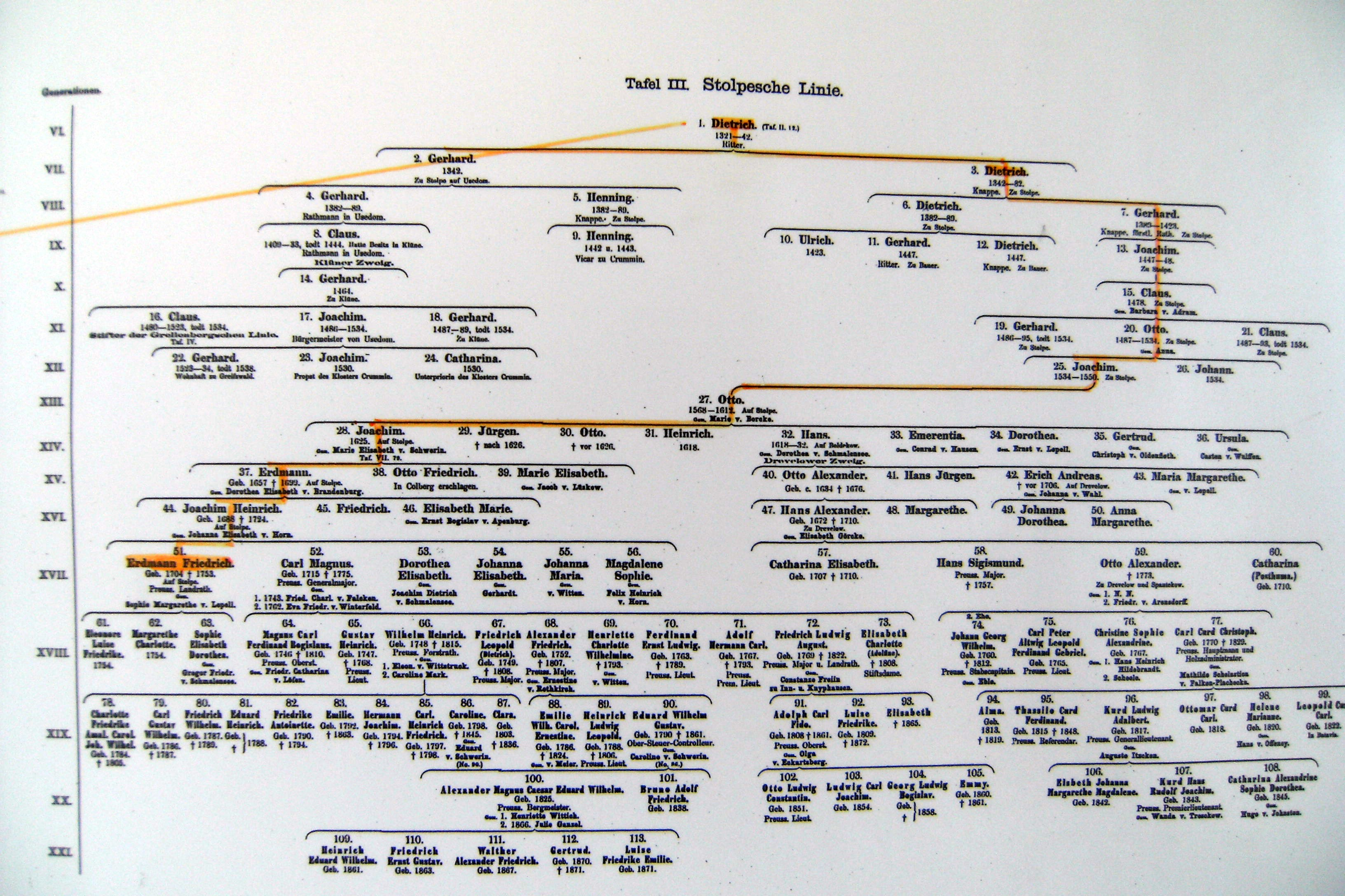 Grafen von Schwerin - Linie Stolpe